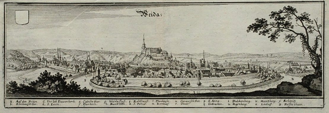 Kupferstich 11 x 32,5 cm aus »Topographia Superioris Saxsoniae Thuringiae Misniae Lusatiae etc.« 1650 nach einer Zeichnung von Wilhelm Dilich (*1571/72 – †1650 Dresden)